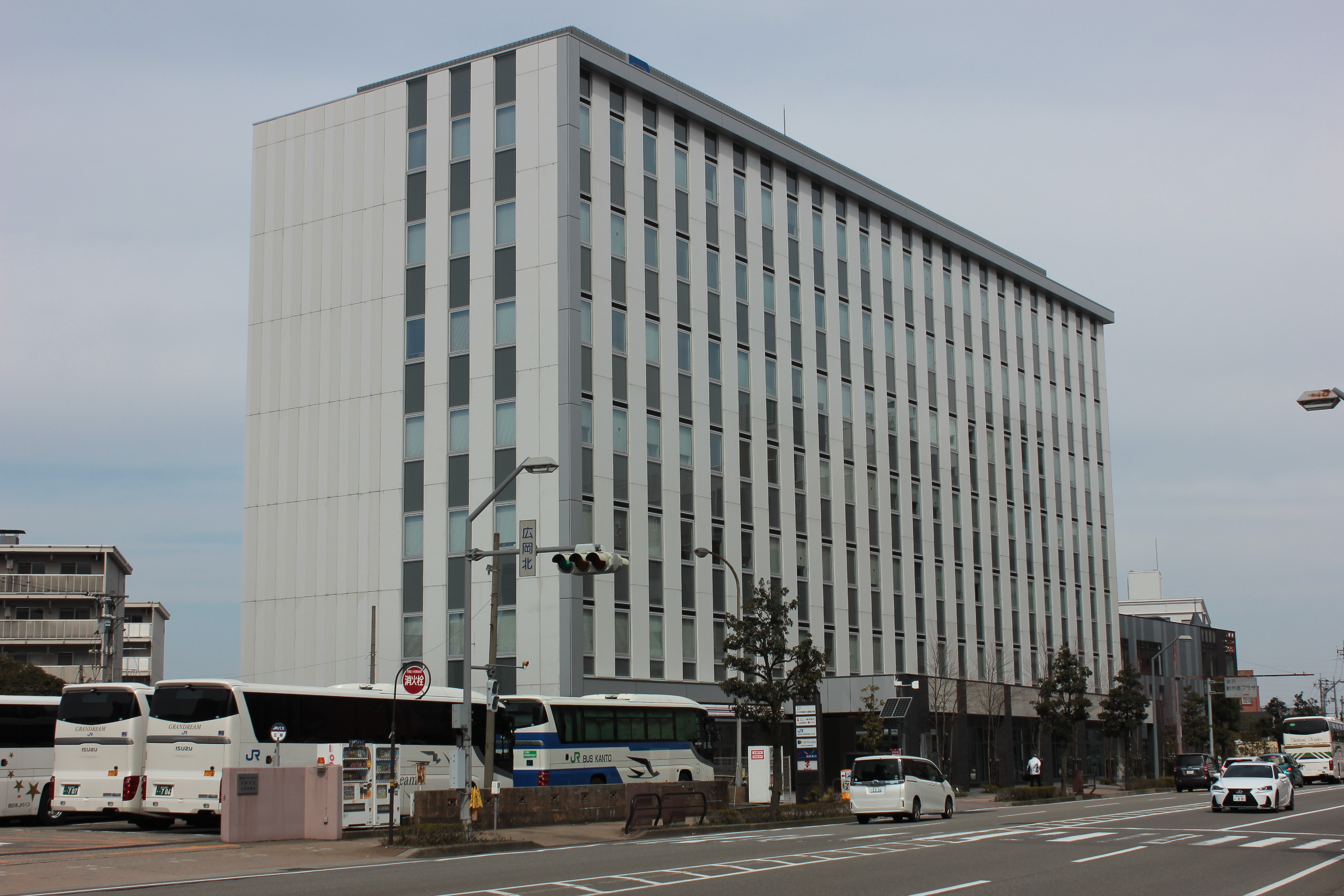 西日本旅客鉄道（JR西日本）金沢支社が入居するJR金沢駅西第一NKビル Canon EOS Kiss X5